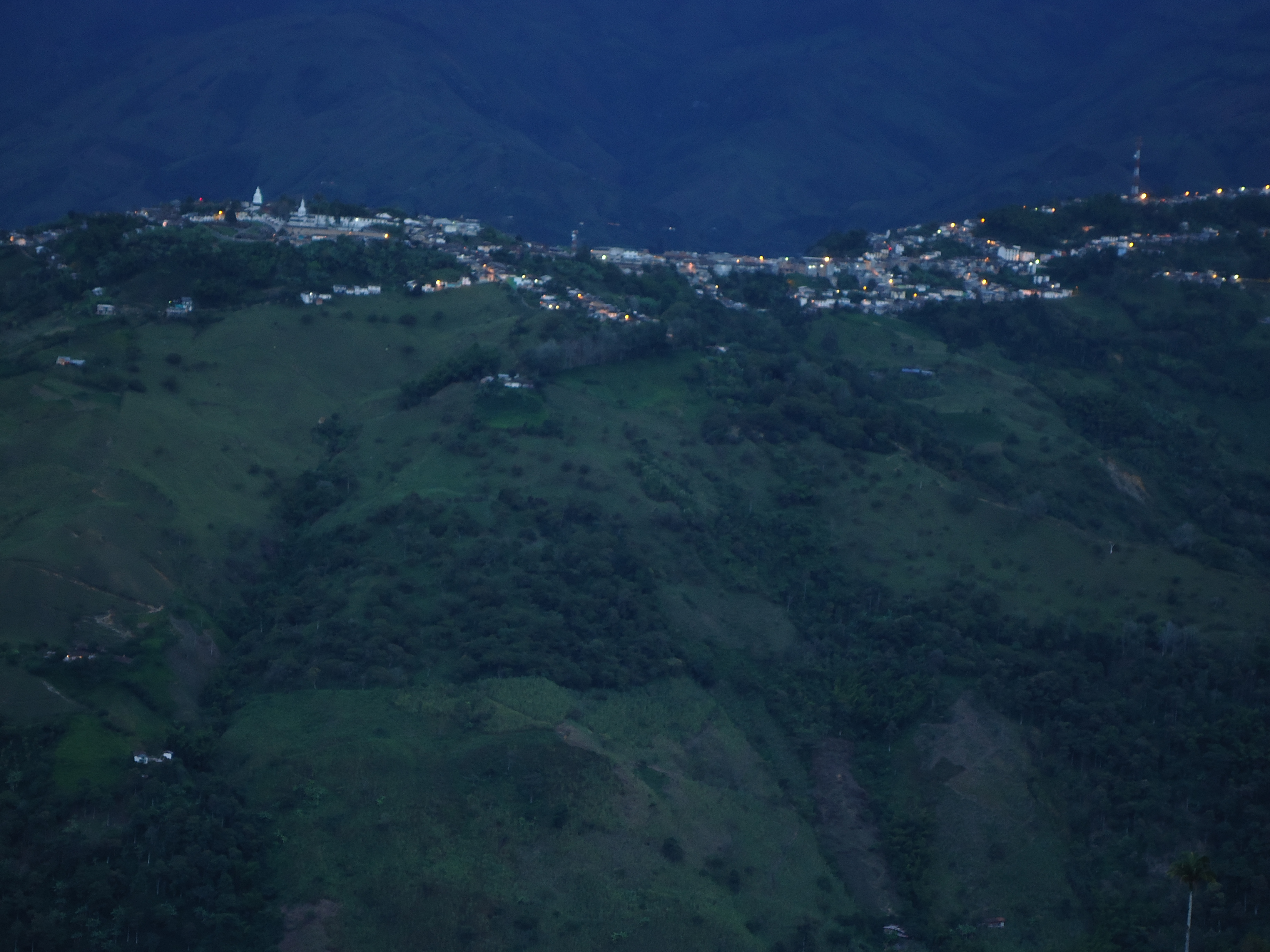 atardecer en Salamina. a lo lejos.